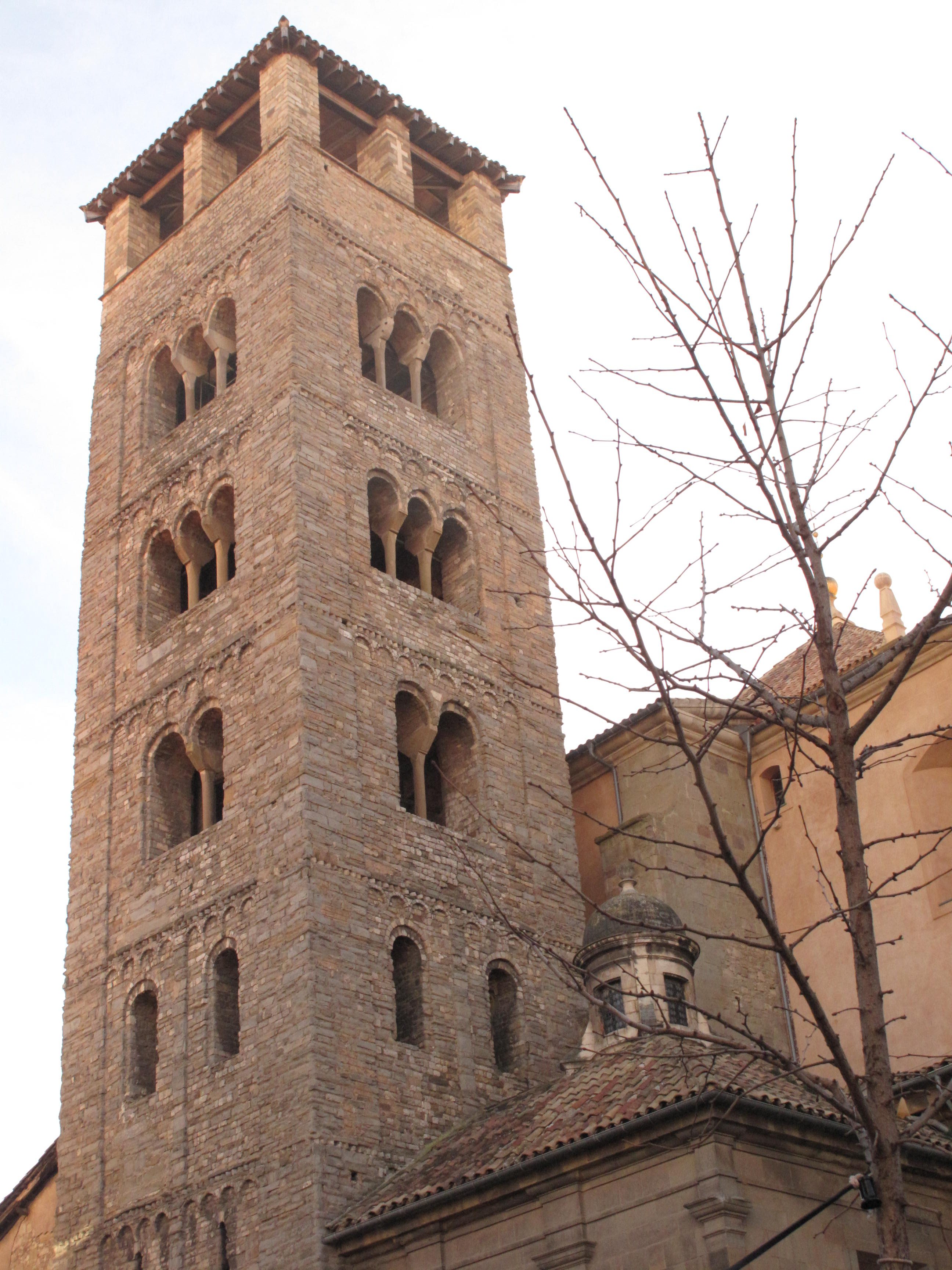 Catedral de Sant Pere (Vic)